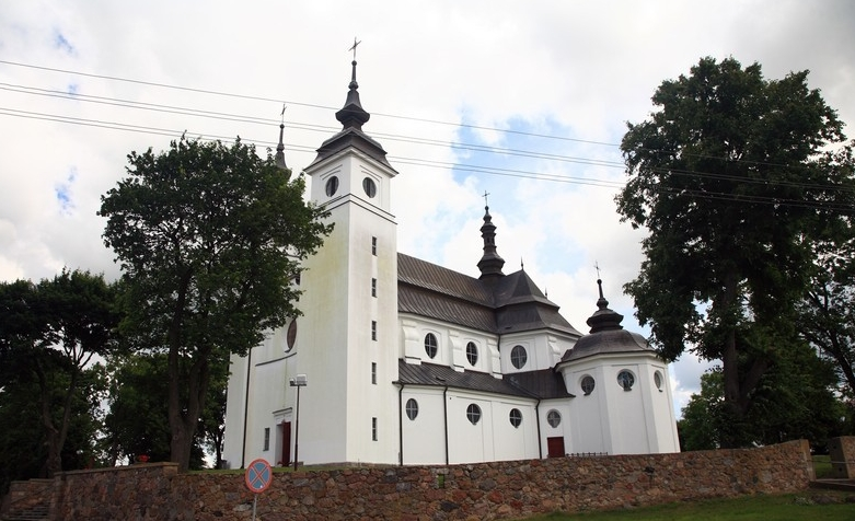 Goniądz – miasto w woj. podlaskim, w powiecie monieckim